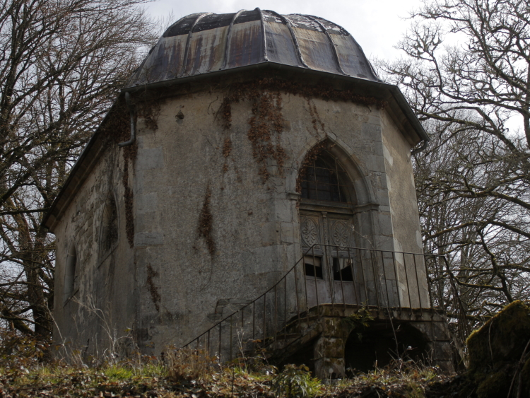 La chapelle de Notre-Dame de Montserat, sur le terrain de l'ancien château de Madic, dans le Cantal en Auvergne